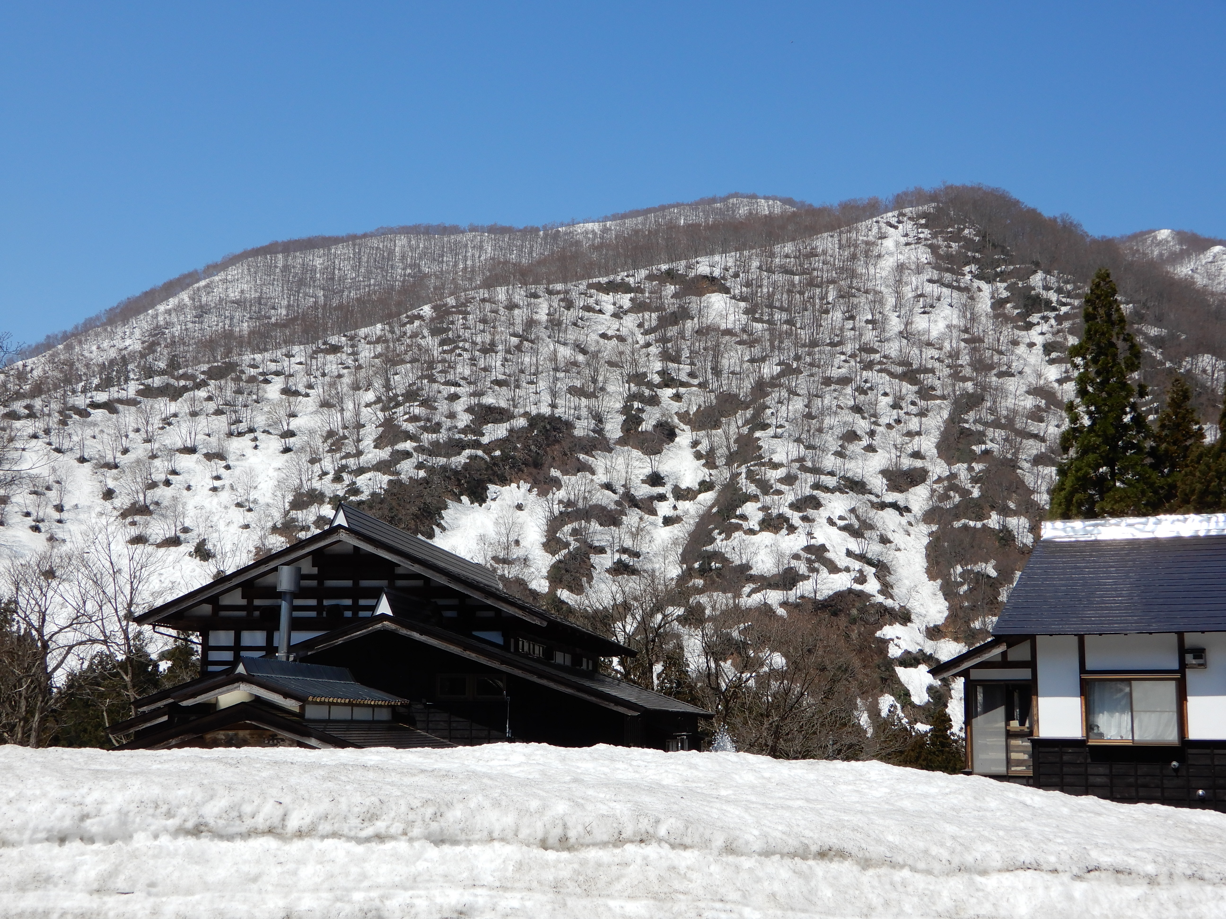 雲天より（2019-04-18）